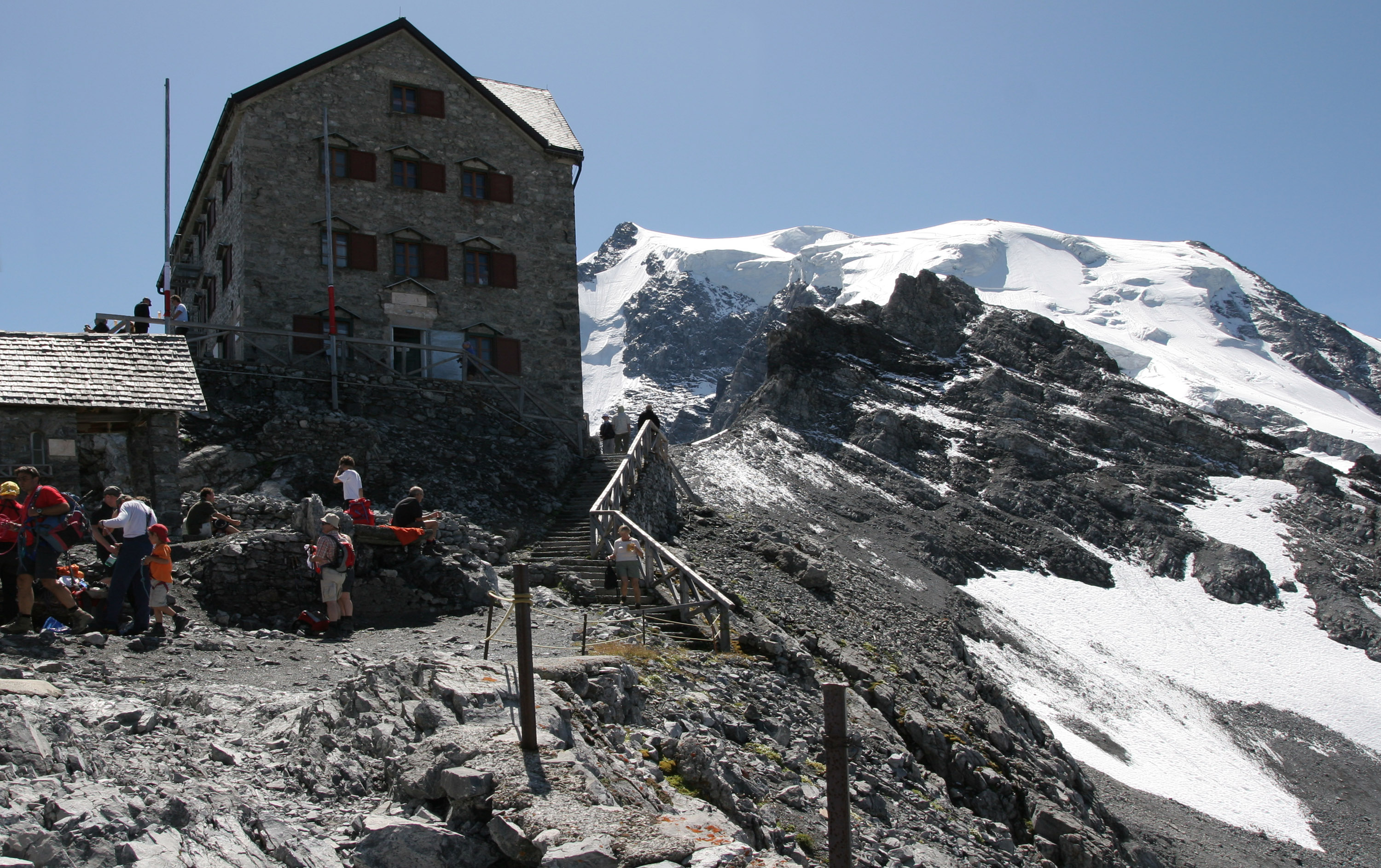 Die Payerhütte bei Sulden bzw. Trafoi in Südtirol. Rechts von der Hütte der Ortler.